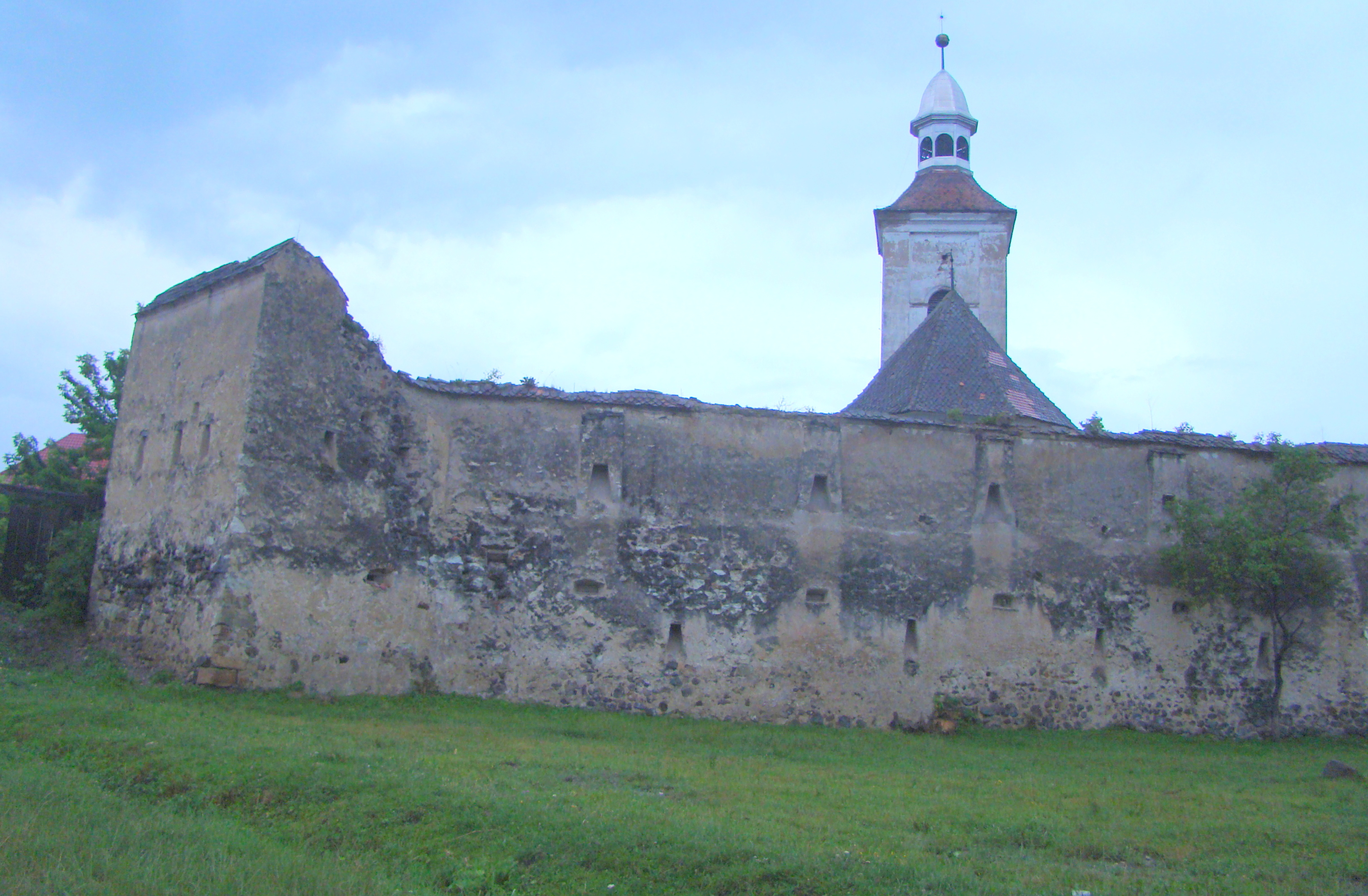 Ansamblul bisericii evanghelice fortificate, sat Mercheașa; comuna Homorod 339 sec. XIII-XIX